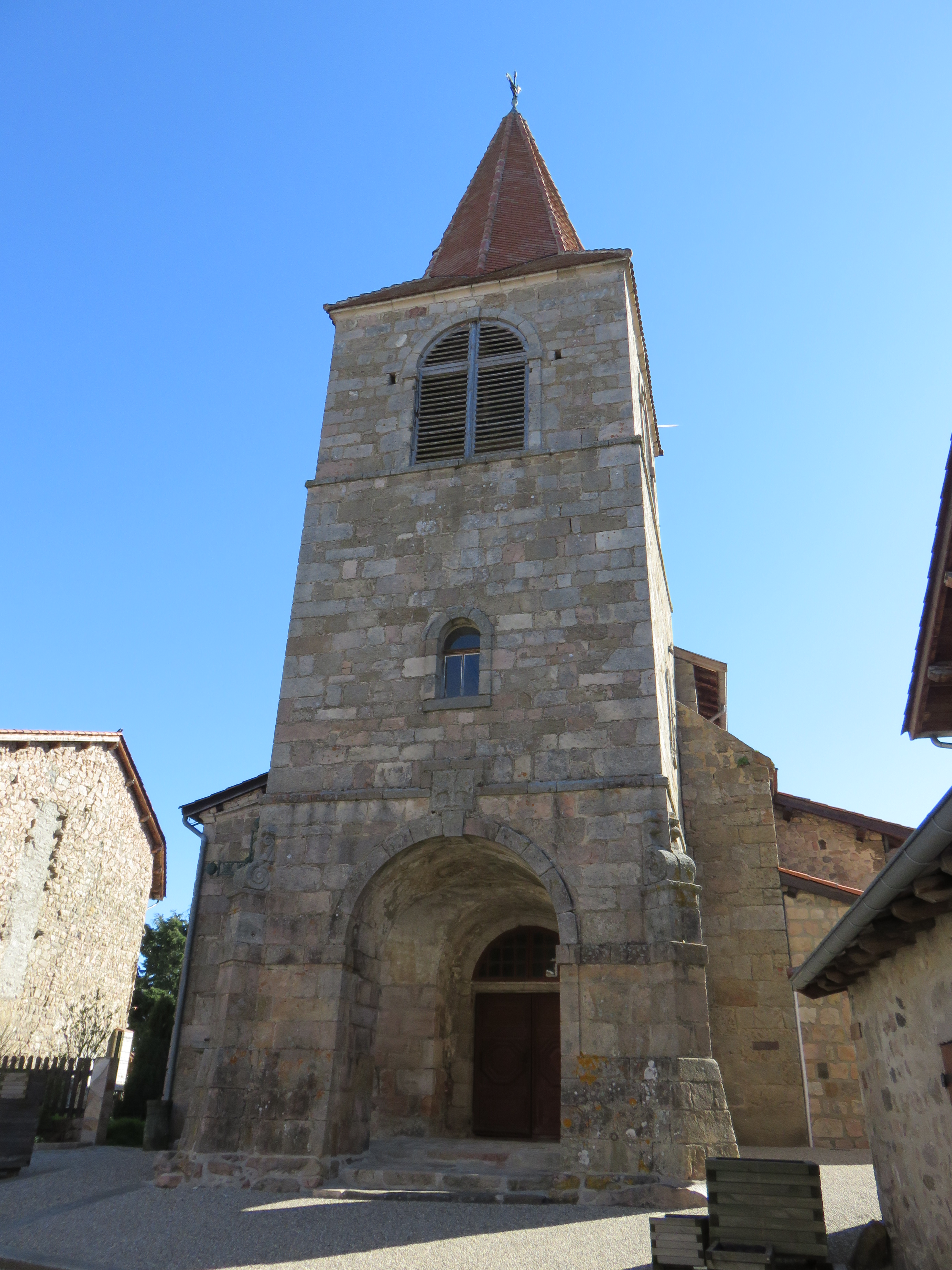 Église Saint-Georges de Saint-Georges-Lagricol, en Haute-Loire.